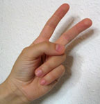 Chinesische Zahl Zwei